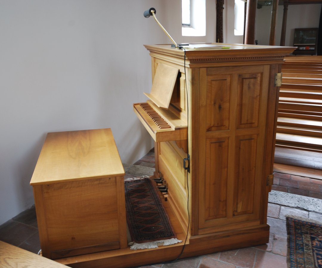 Bremgarten: Orgel der St. Klarakapelle